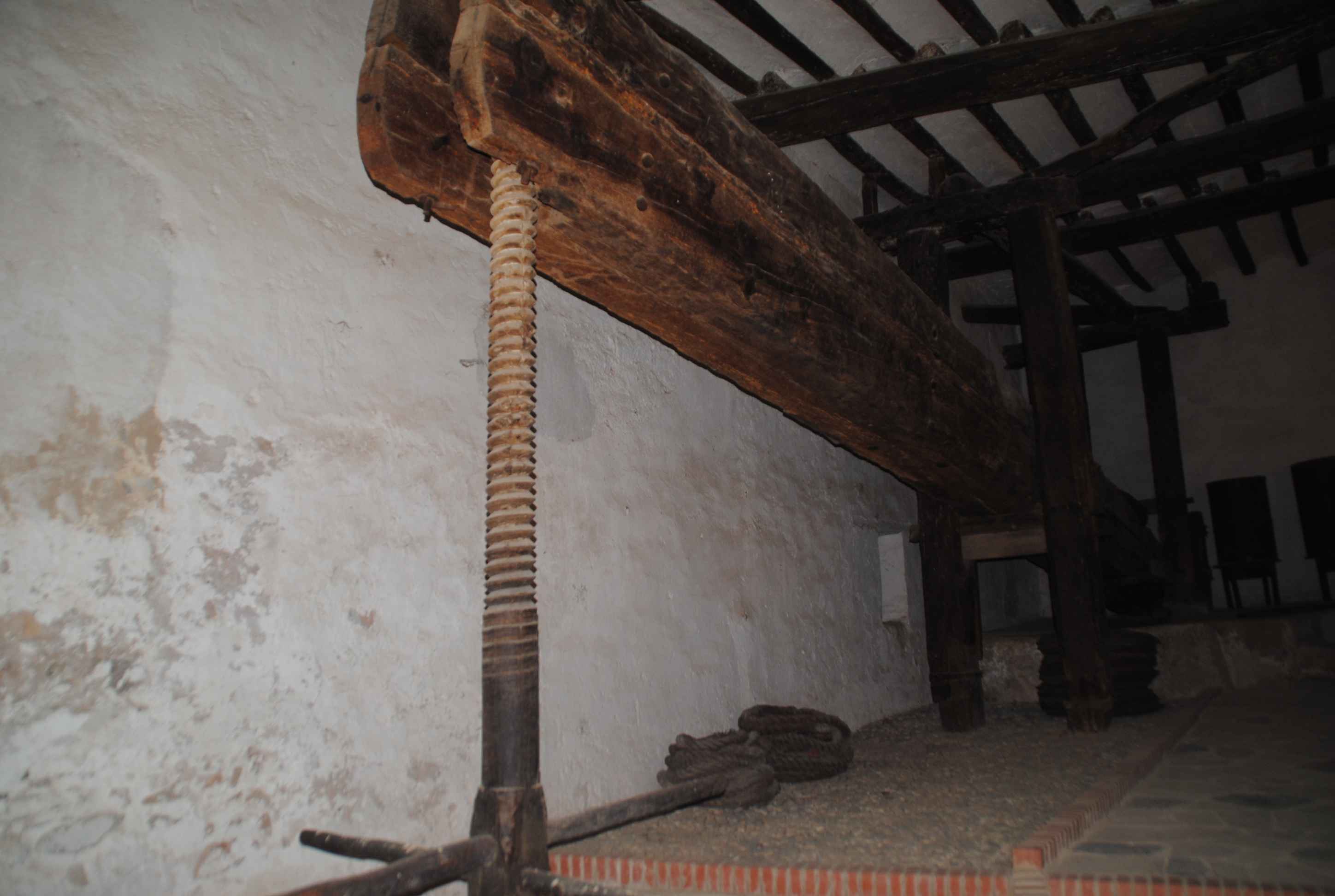 Premsa de lliura, de viga o de barra i trull d'oli.